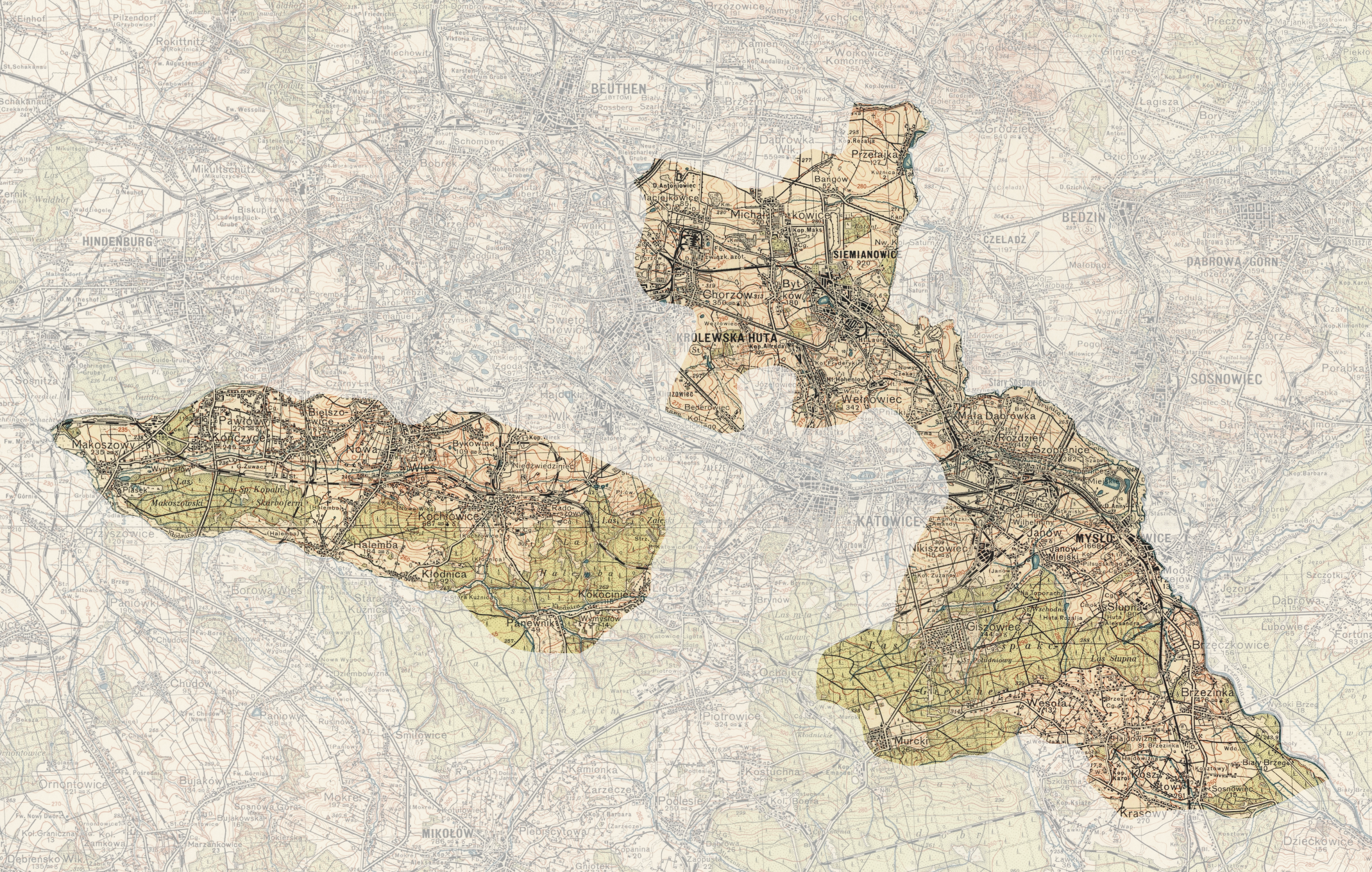 Powiat katowicki w 1933. Kompilacja 4 arkuszy mapy 1:100.000 Wojskowego Instytutu Kartograficznego oraz granic powiatu z innych źródeł Licensing Podkład topograficzny: Granice